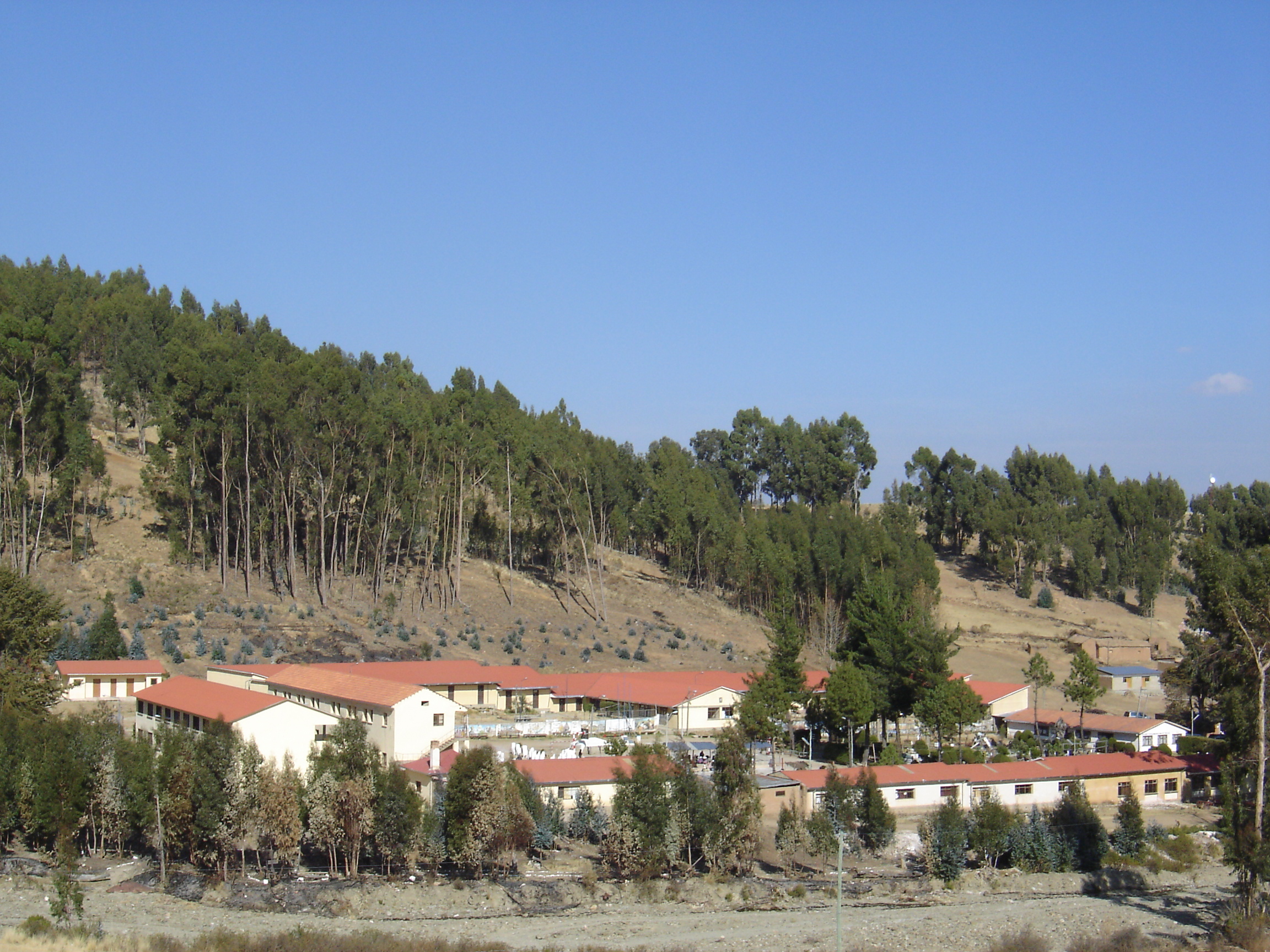 Runa Simi: Wallpama yachaywasi yachachipkuna chantakunankupaq, Challwamayu markapi, Wak'as sapsipi, Wuliwya suyu.